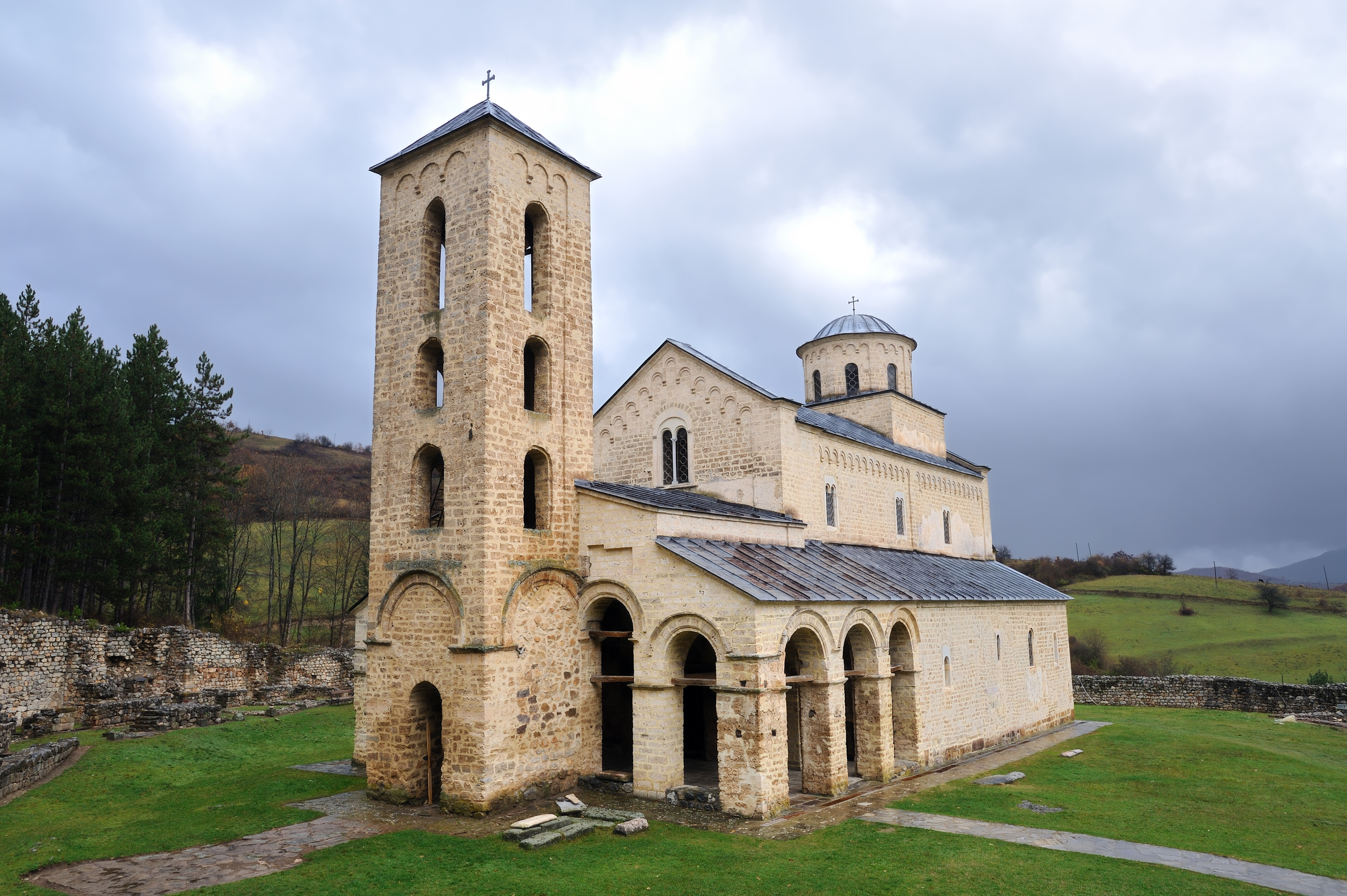 Manastir Sopocani